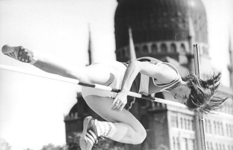 Rosemarie Ackermann ADN-ZB Kluge 3.7.77 Dresden: DDR-Leichtathletik-Meisterschaften. 4. Tag. Hochsprung-Olympiasiegerin Rosemarie Ackermann (SC Cottbus) gewann die Konkurrenz und stellte mit 1,96 m ihren eigenen Weltrekord ein.